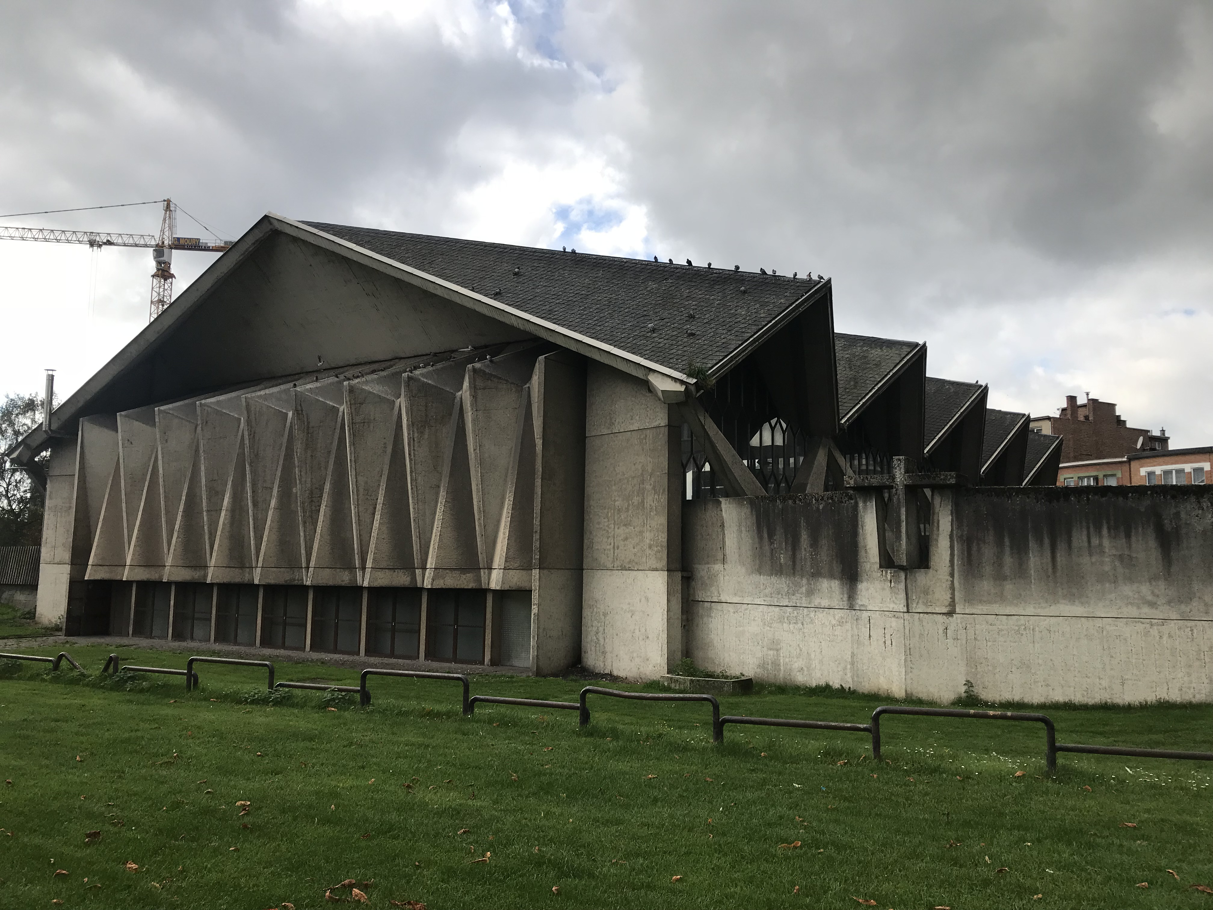 Eglise paroissiale Saints-Pierre-et-Paul à Droixhe, Liège